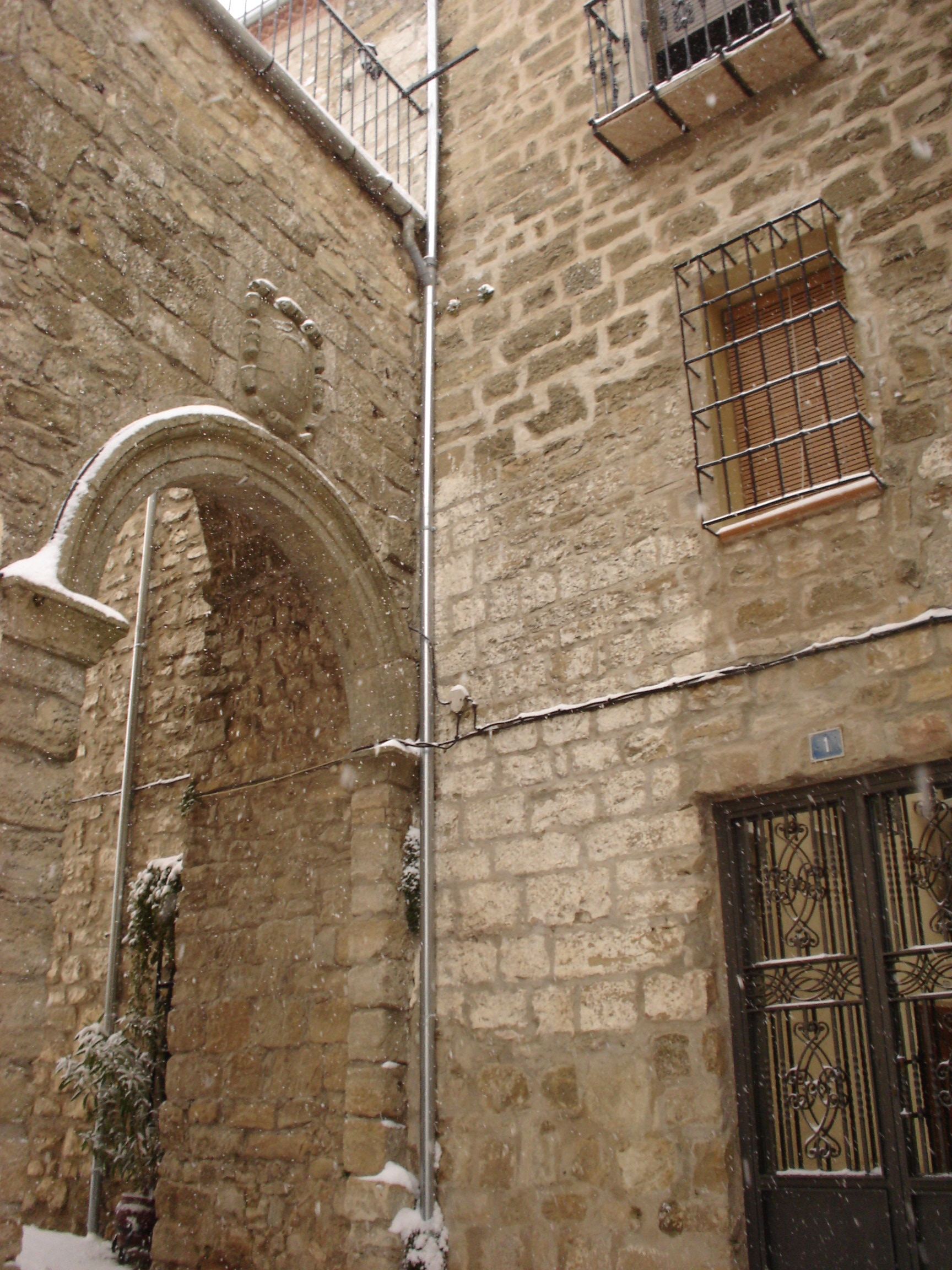 Una de las puertas del recinto amurallado de Iznatoraf.